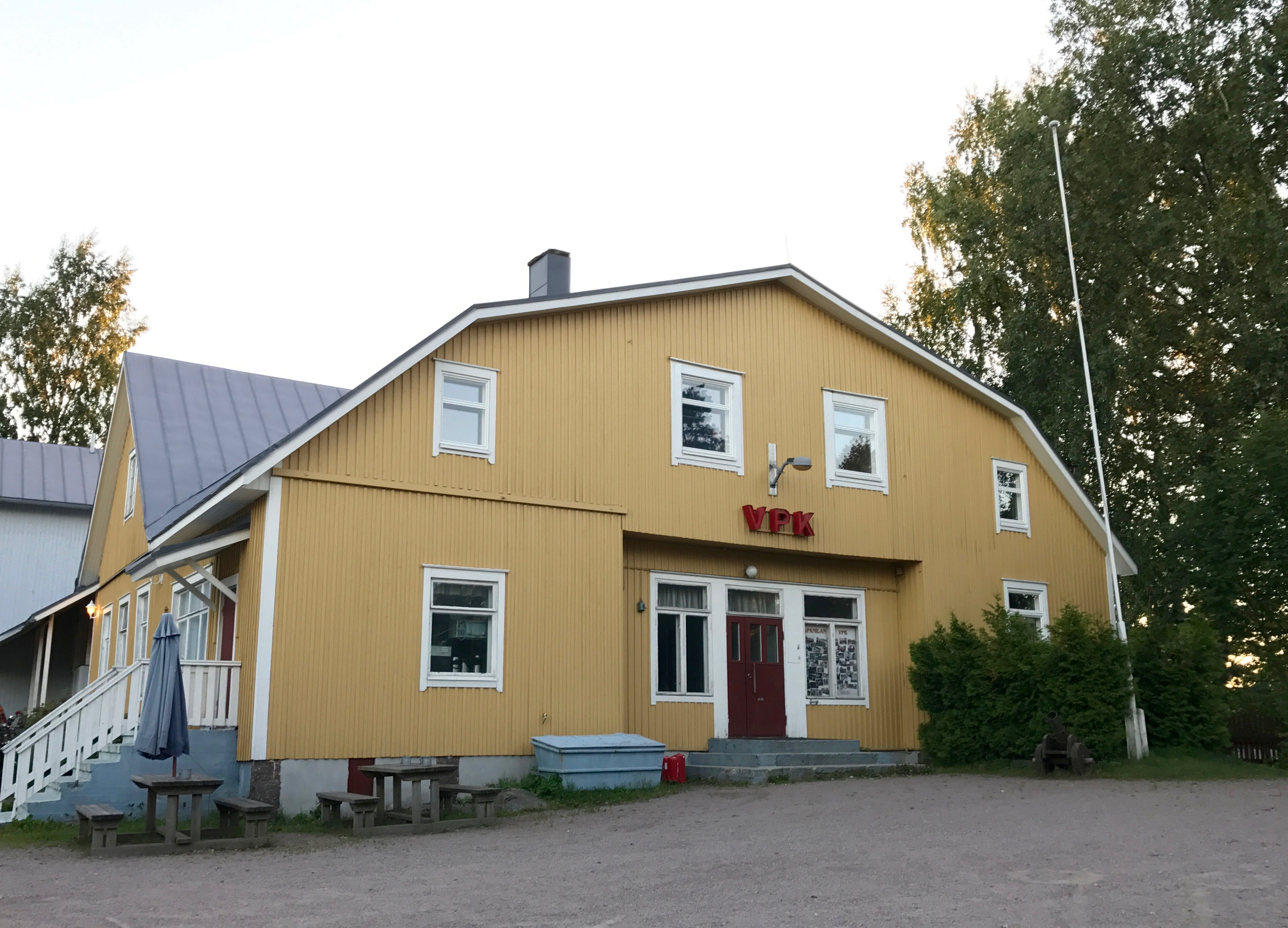 Tapanilan VPK:n palokuntatalo Helsingissä, osoitteessa Päivöläntie 50.